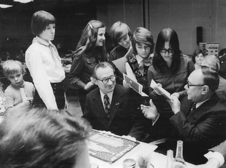 Neujahrsfest, Botschafter der UdSSR ADN-ZB Katscherowski 29.12.74 Berlin-Zum Jolkafest in Spree-Athen trafen sich am 29.12.74 Bürger der DDR-Hauptstadt und der Sowjetunion. Herzlich begrüßte Gäste dieses Festes, das im Rahmen der Sendung des Berliner Rundfunks "7 - 10 - Sonntagmorgen in Spreeathen" im Interhotel "Stadt Berlin" stattfand, waren der Botschafter der UdSSR in der DDR, Michail T. Jefremow (r), und der Generalsekretär der Gesellschaft für Deutsch-Sowjetische Freundschaft, Kurt Thieme (l).